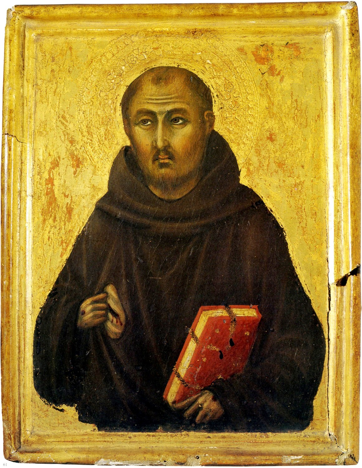 Saint Francisc, Niccolo di Segna